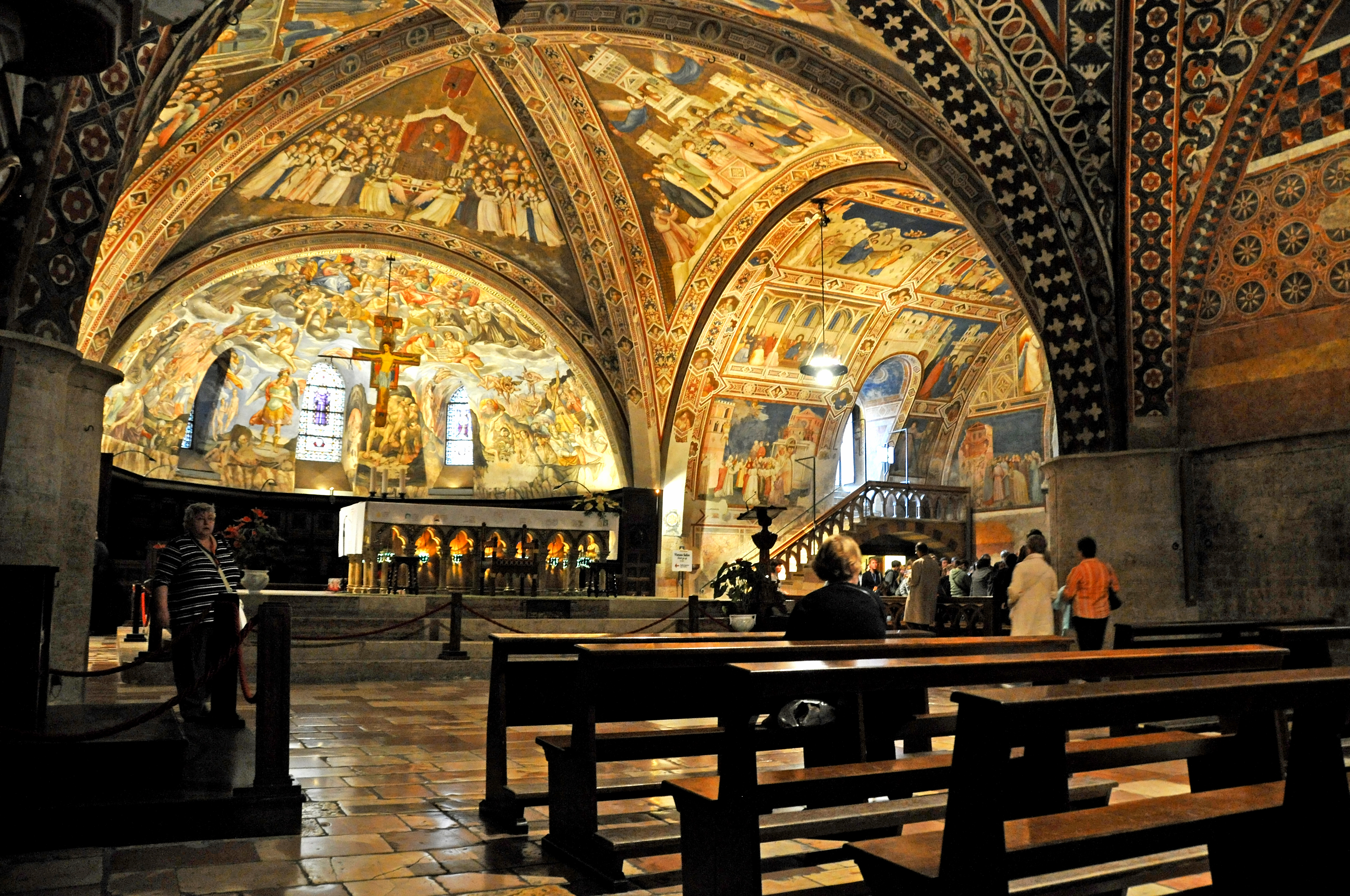 Basílica Inferior de São Francisco de Assis